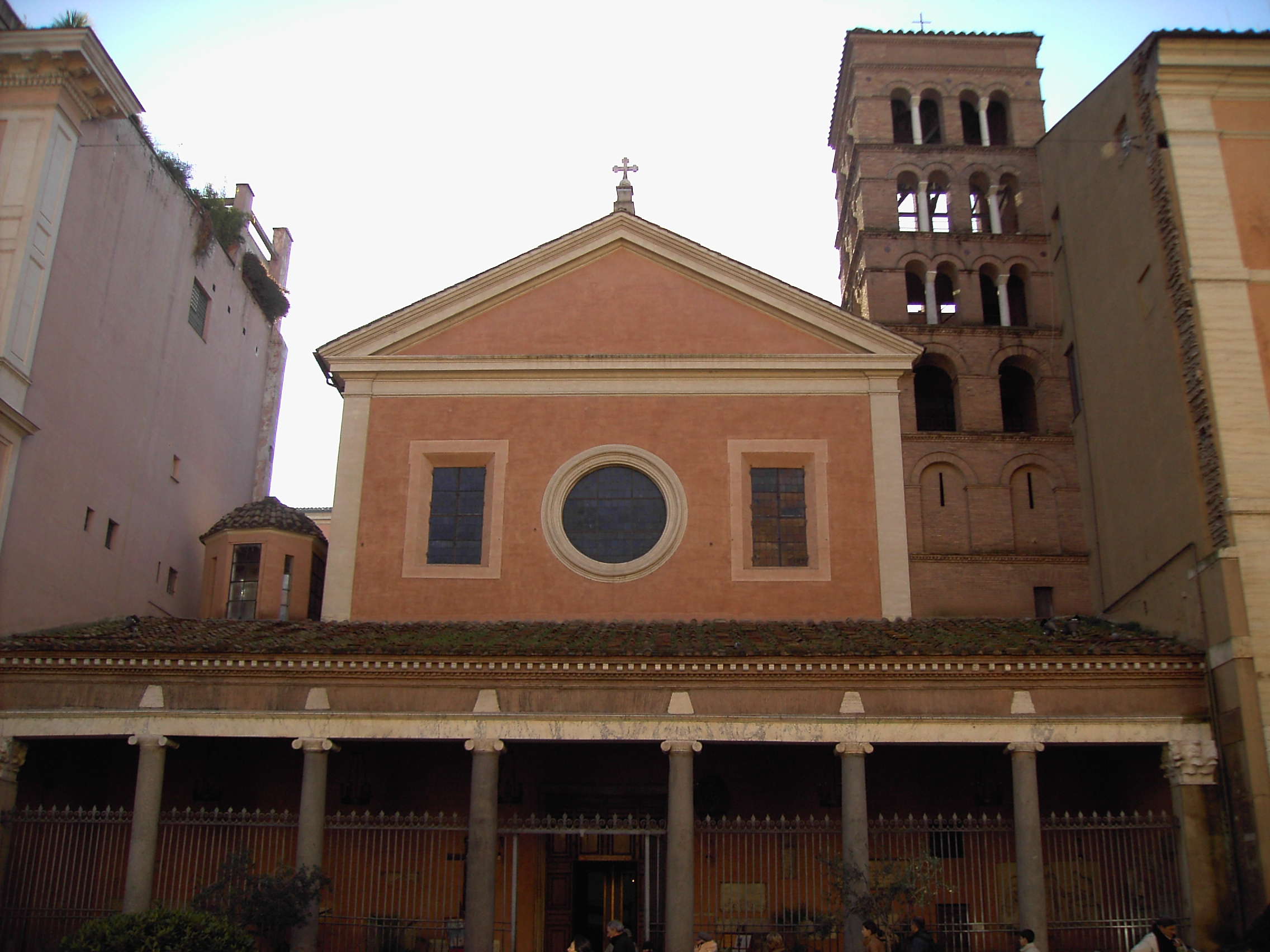 Roma, San Lorenzo in Lucina, facciata